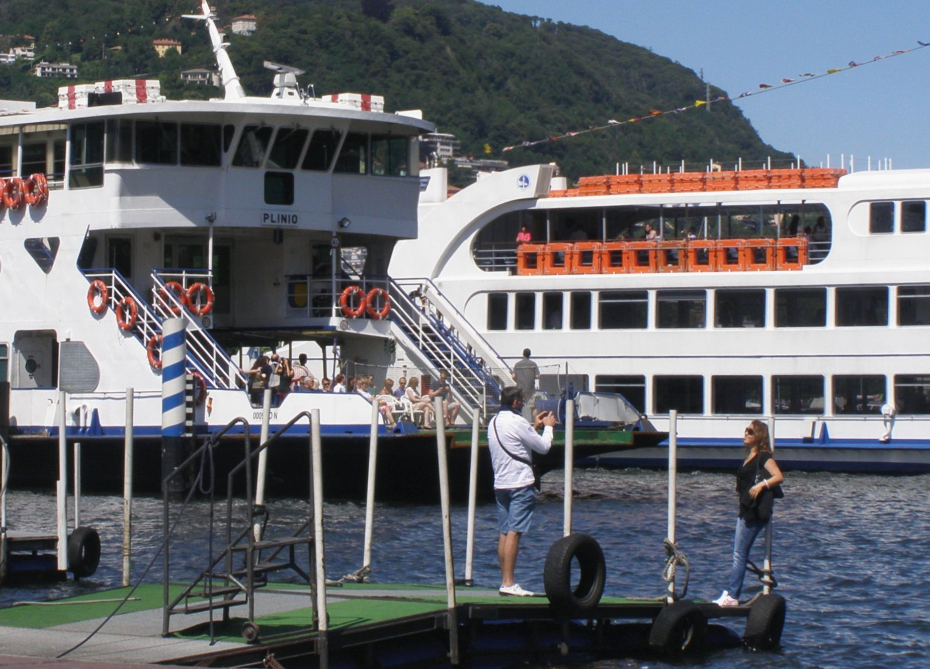 Motonavi di linea in partenza sul lago di Como.